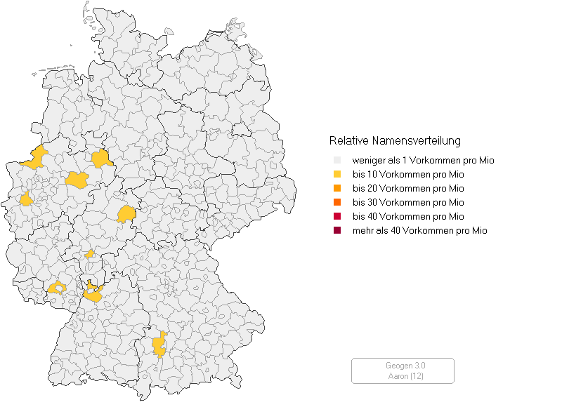 Relative Namensverteilung des namens Aaron